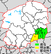 栃木県芳賀郡の範囲（1.益子町 2.茂木町 3.市貝町 4.芳賀町）